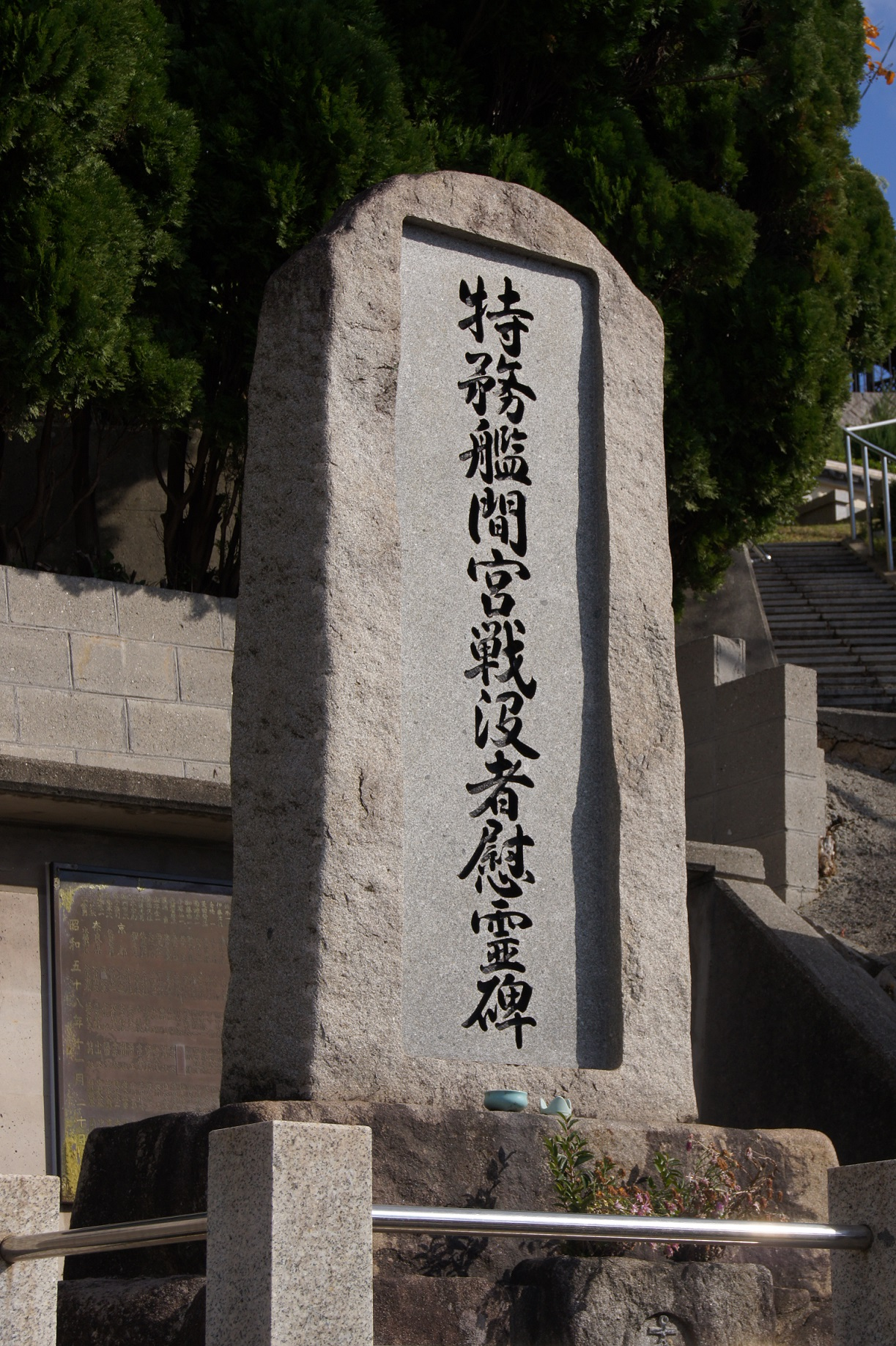 間宮 (給糧艦)のja:慰霊碑（呉市長迫公園）